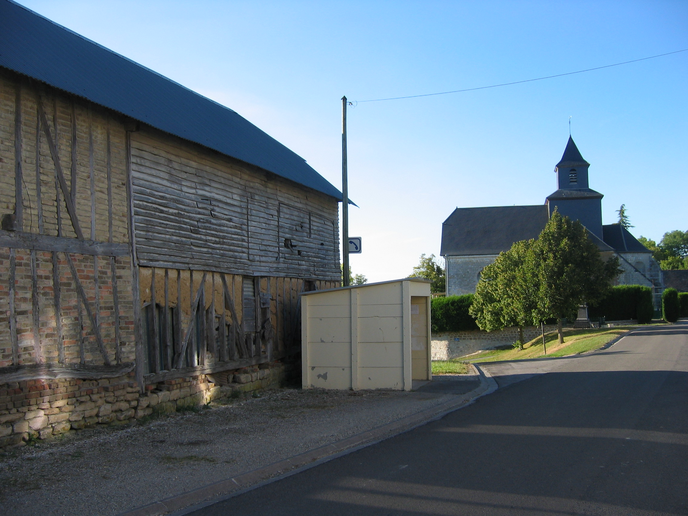 Rue Arnicourt Ardennes France